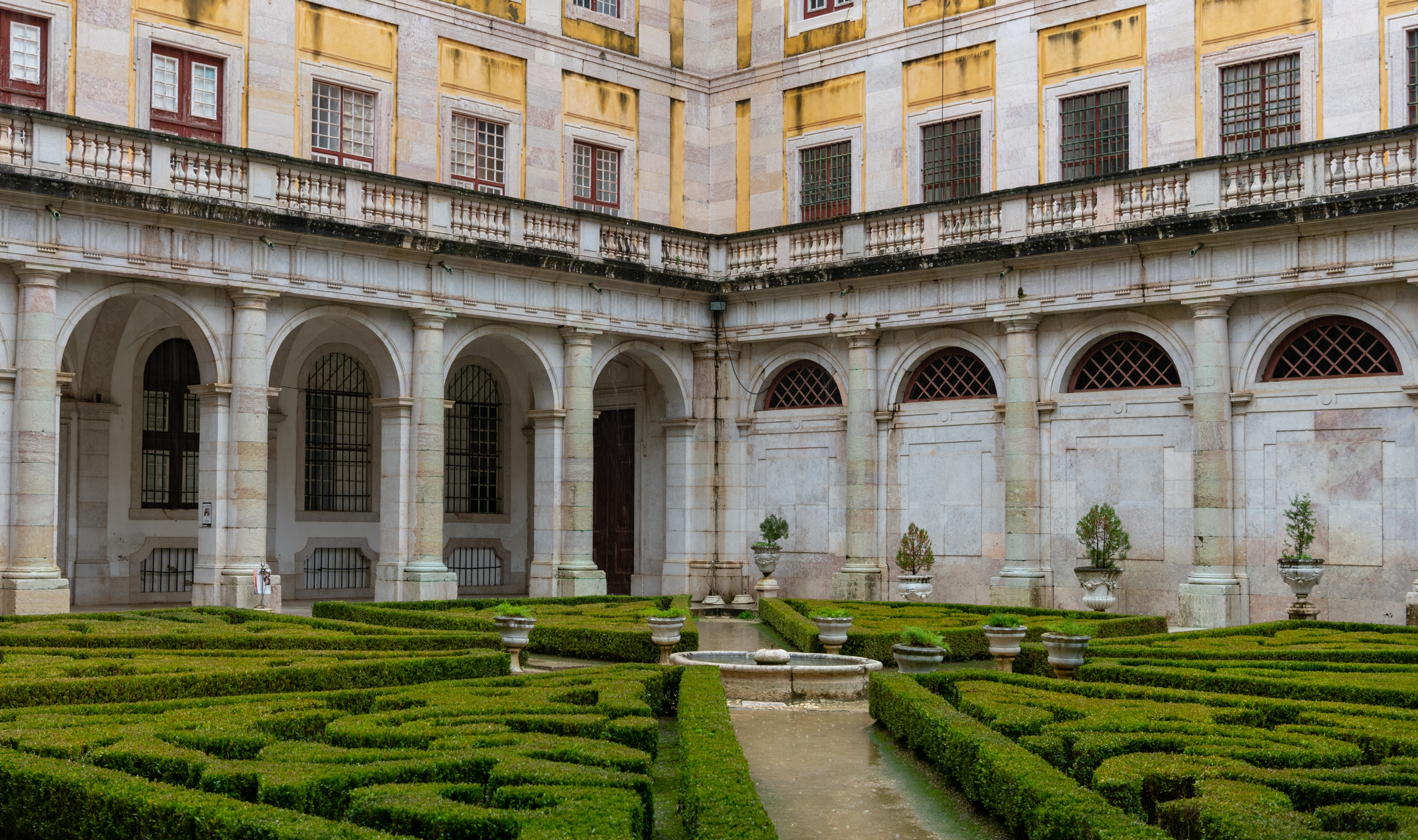 22323-Mafra